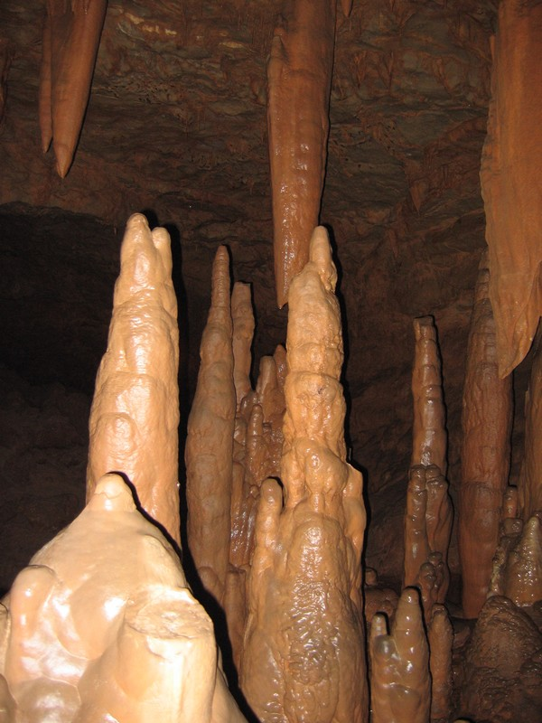 Description: Ensemble de concrétions classiques dans une grotte (Hérault). Stalactites, stalagmites, et piliers stalagmitiques ou colonnes. Source: Hugo Soria Licence: GFDL Hugo Soria